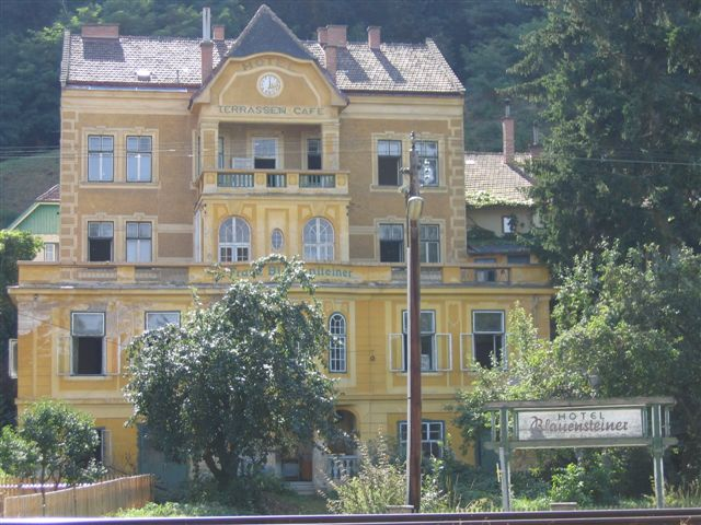 Die Garser Hotel-Pension von Heimito von Doderers Freund und Lieblingswirt Franz Blauensteiner, wo Doderer 1956 eine Woche lebte und arbeitete. Andreas Weigel: Heimito von Doderers Gars-Woche. Gedruckt (zusätzlich mit der Erstveröffentlichung einer Fotografie, die Doderer mit dem Ehepaar Blauensteiner in ihrem Gasthaus „Zur Stadt Paris“ zeigt,) in: Andreas Weigel: Stars in Gars. Schaffen und Genießen. Reich bebilderte Geschichte der Sommerfrische Gars-Thunau von ihren Anfängen bis zur Gegenwart. In: Stars in Gars. Schaffen und Genießen. Künstler in der Sommerfrische. Herausgegeben vom Museumsverein Gars, Zeitbrücke-Museum Gars (Gars 2017) S. 9–174, hier S. 133–136. ISBN 978-3-9504427-0-0.